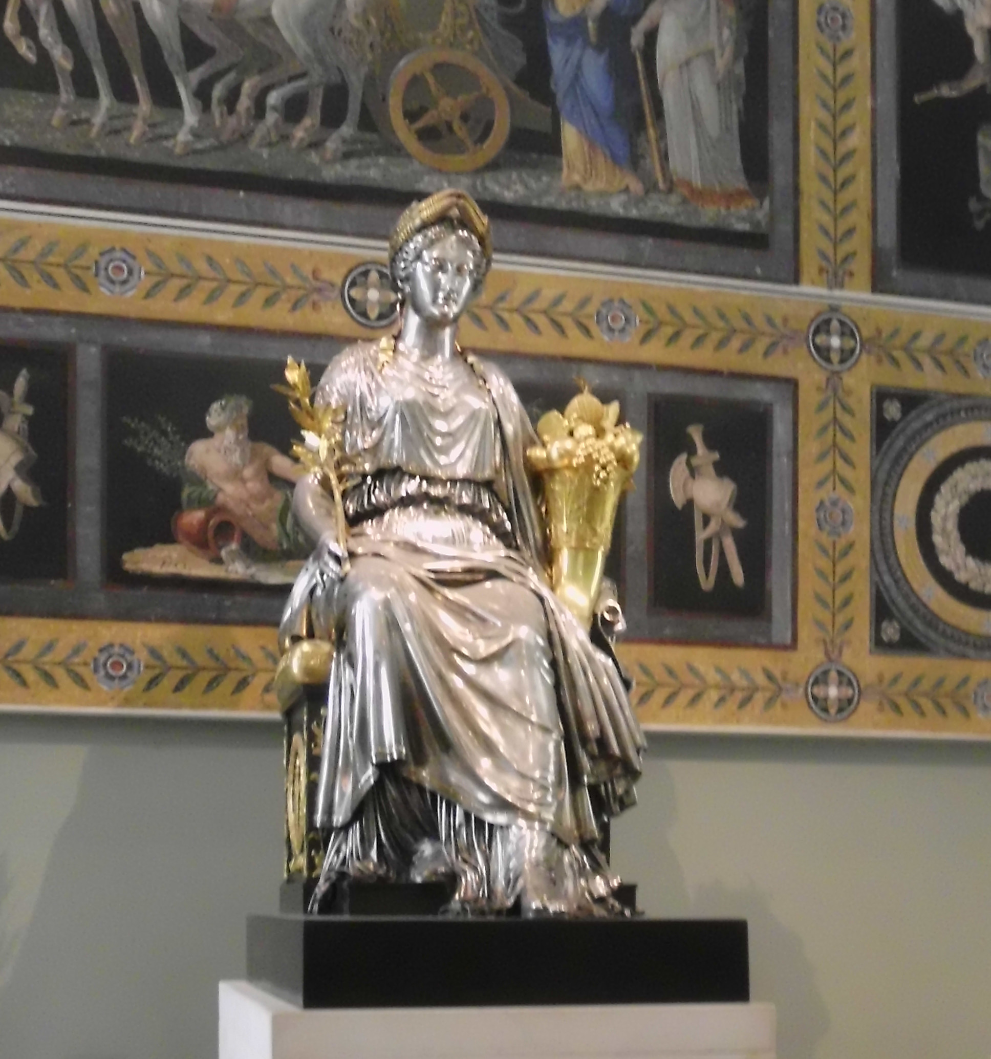 Sculpture commandée pour commémorer la paix d'Amiens (1802). La statue tient dans sa main une branche d'olivier symbole de paix (à l'origine : un caducée, remplacé vers 1832 par le bronzier Pierre-Maximilien Delafontaine). Ainsi qu'une corne d'abondance et elle porte une couronne d'épis symboles de la prospérité suivant la paix.